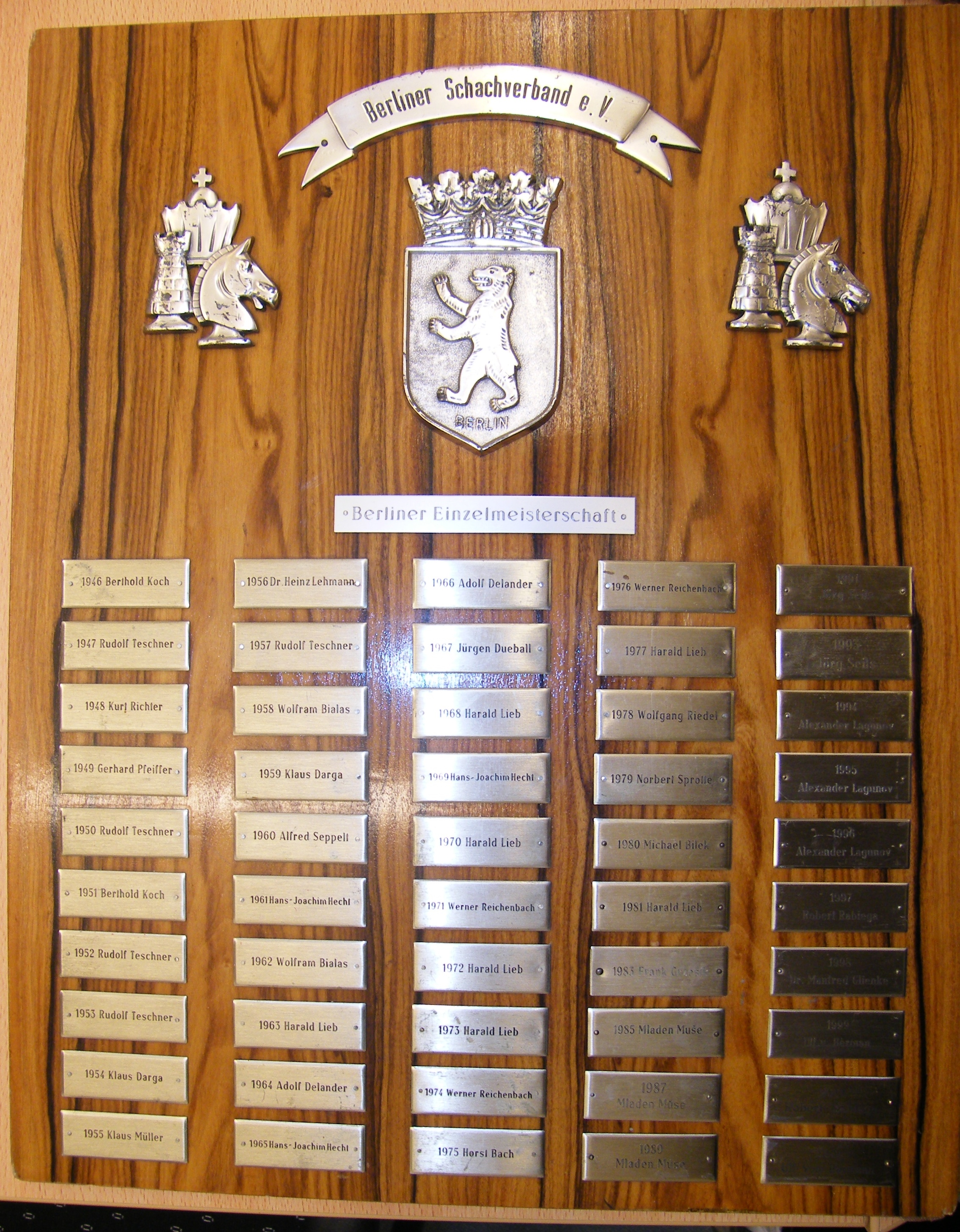 Ehrentafel der Berliner und West-Berliner Schachmeister von 1946 bis 2001. Die Tafel hängt in der Geschäftsstelle des Berliner Schachverbandes.